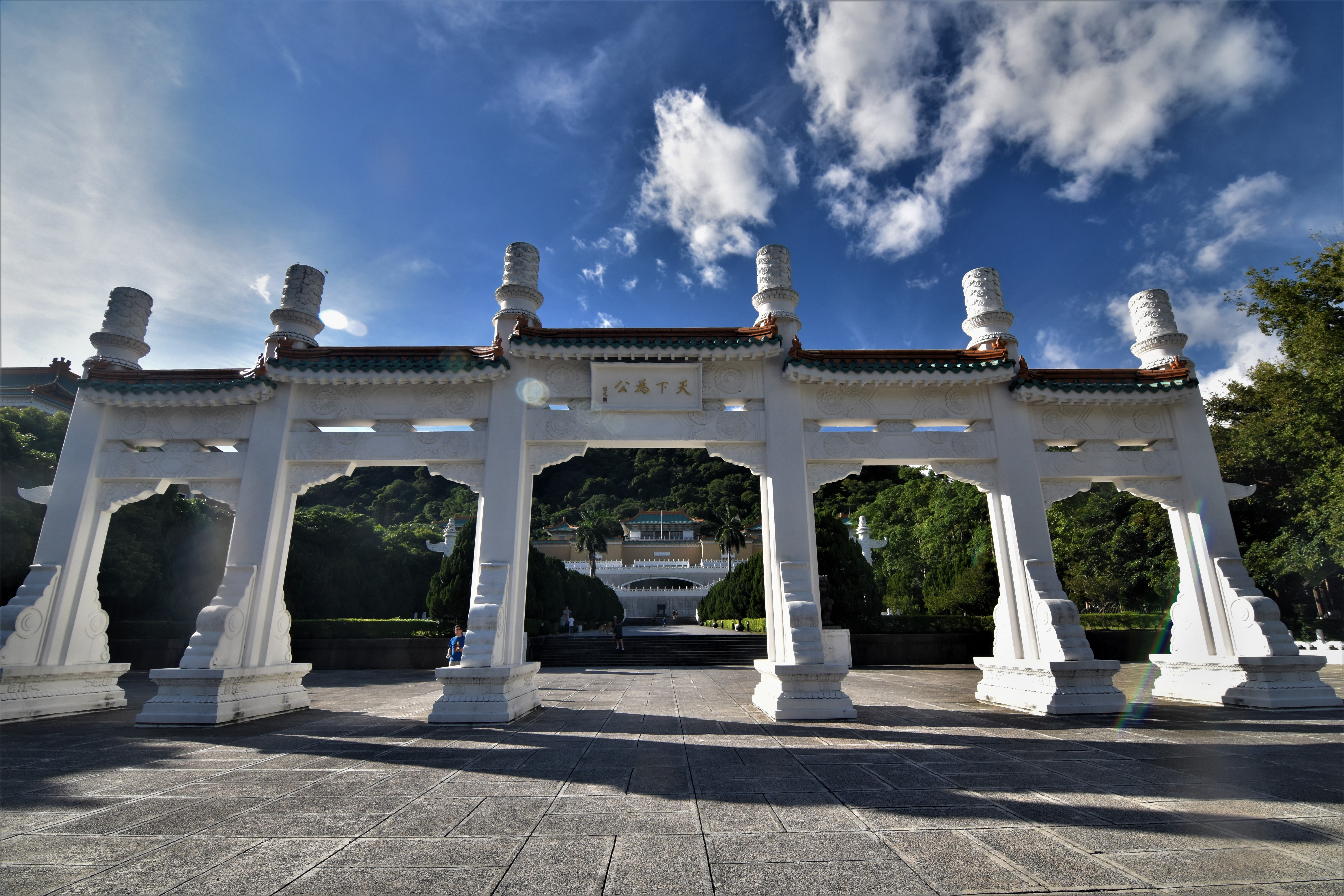 中文（台灣）: 國立故宮博物院收藏華夏文物，原多為過往古物陳列所舊藏，為熱河、瀋陽行宮所有三處清宮之文物，收藏品的年代幾乎囊括了整個中華文化五千年的歷史。 1001805,121.5466225